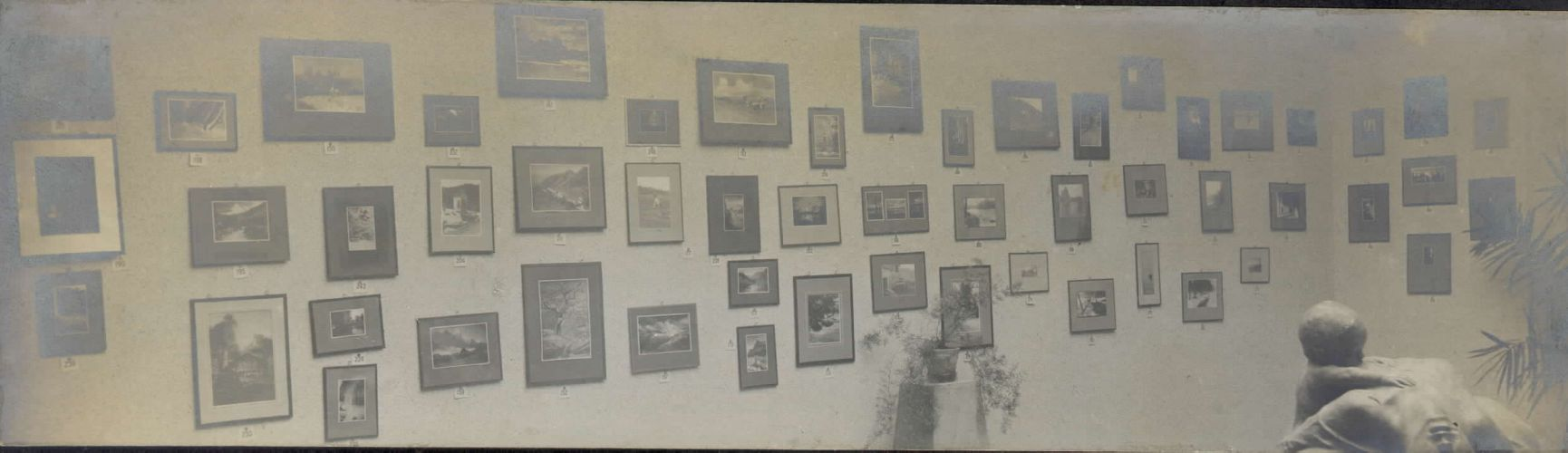 Razstava Kluba slovenskih amater-fotografov v Jakopičevem paviljonu